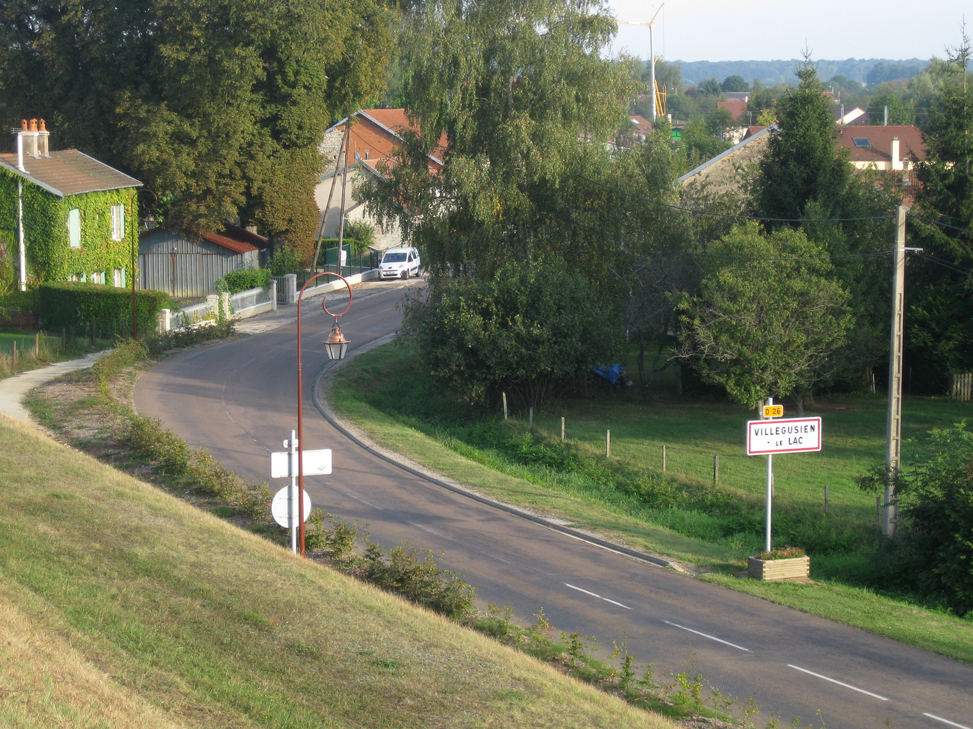 D26